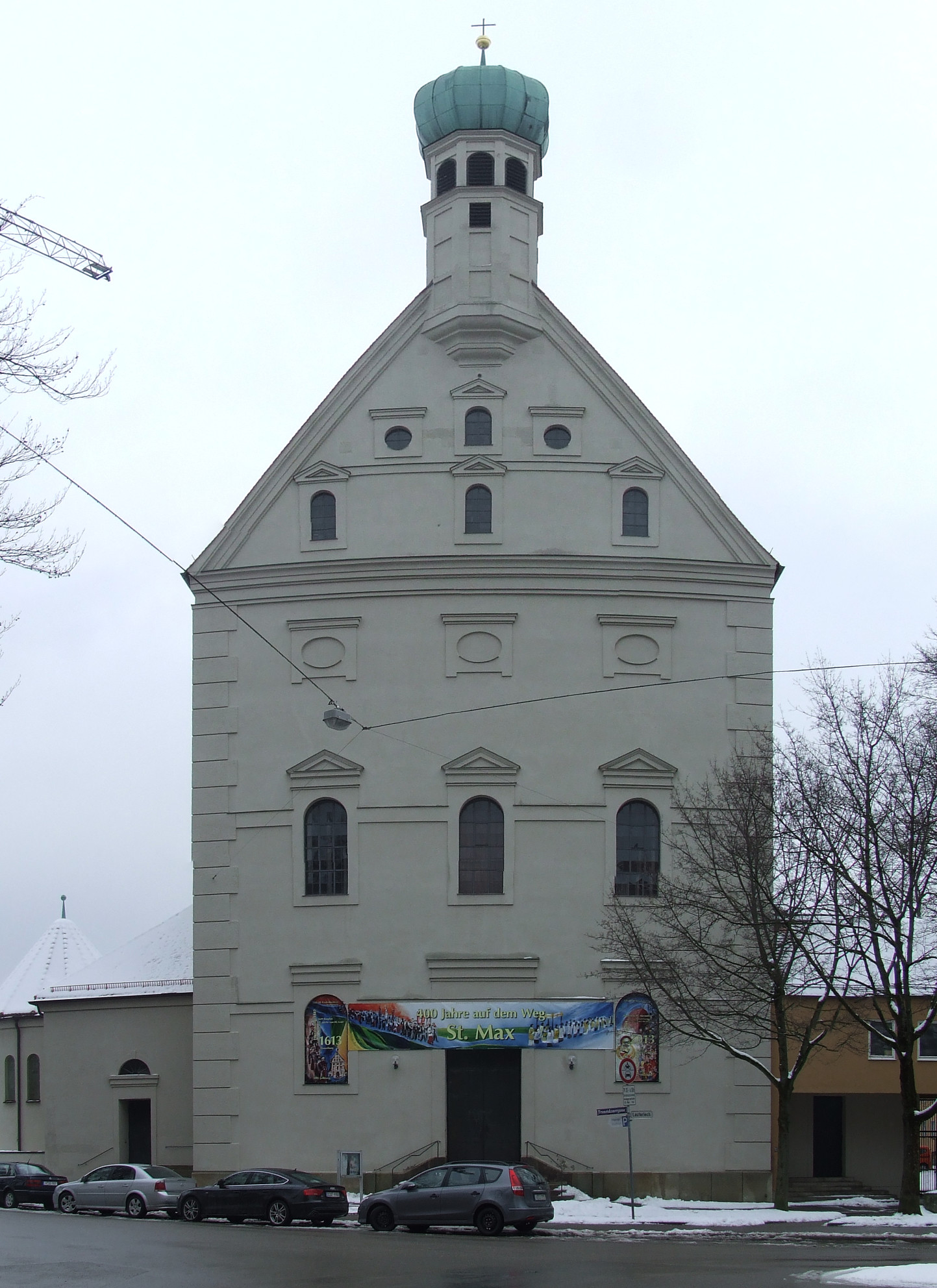 Augsburg, Franziskanergasse 2, Kath. Pfarrkirche St. Maximilian